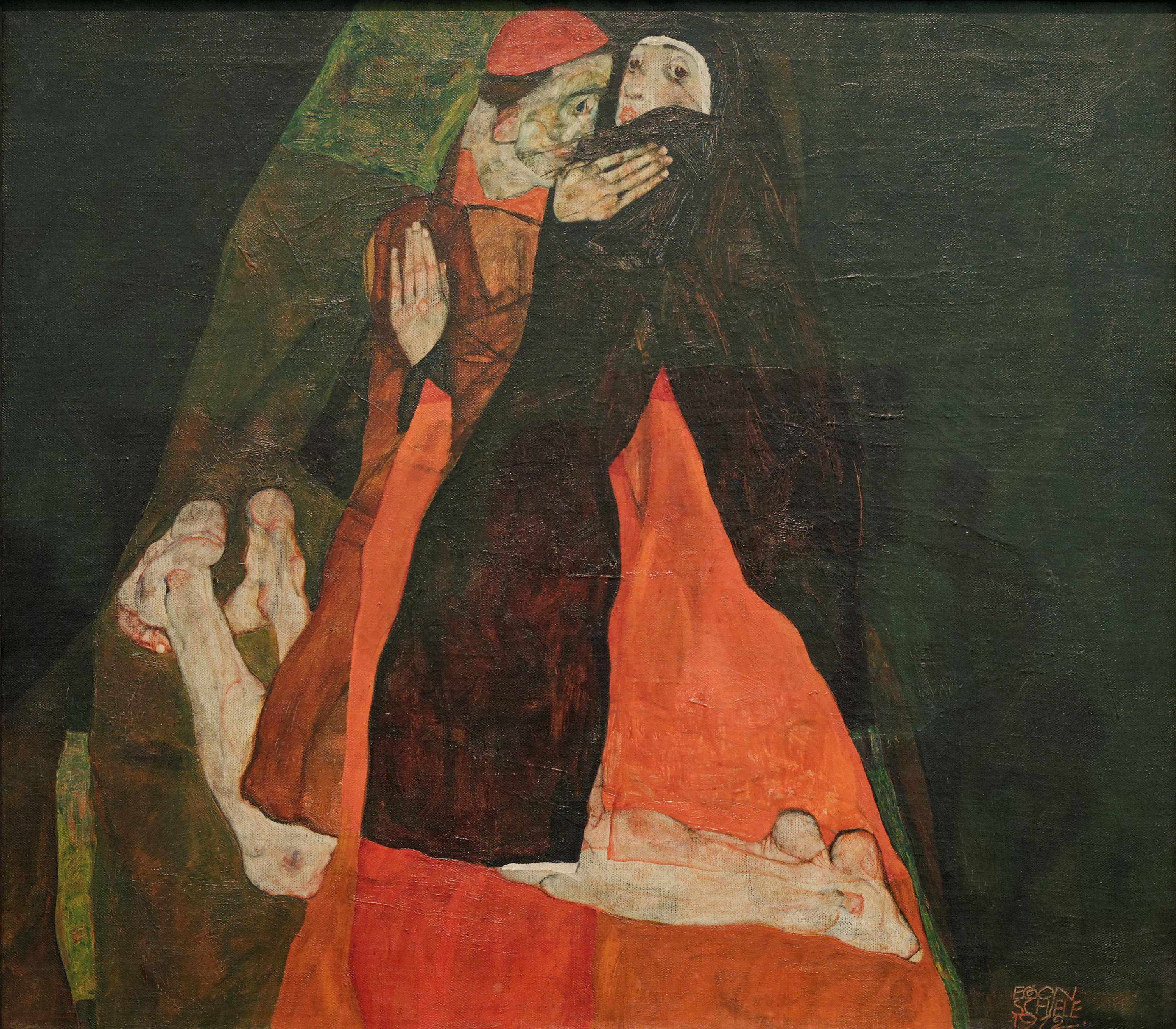 Le Cardinal et la nonne, huile sur toile d'Egon Schiele (1912). Musée Leopold, Vienne.